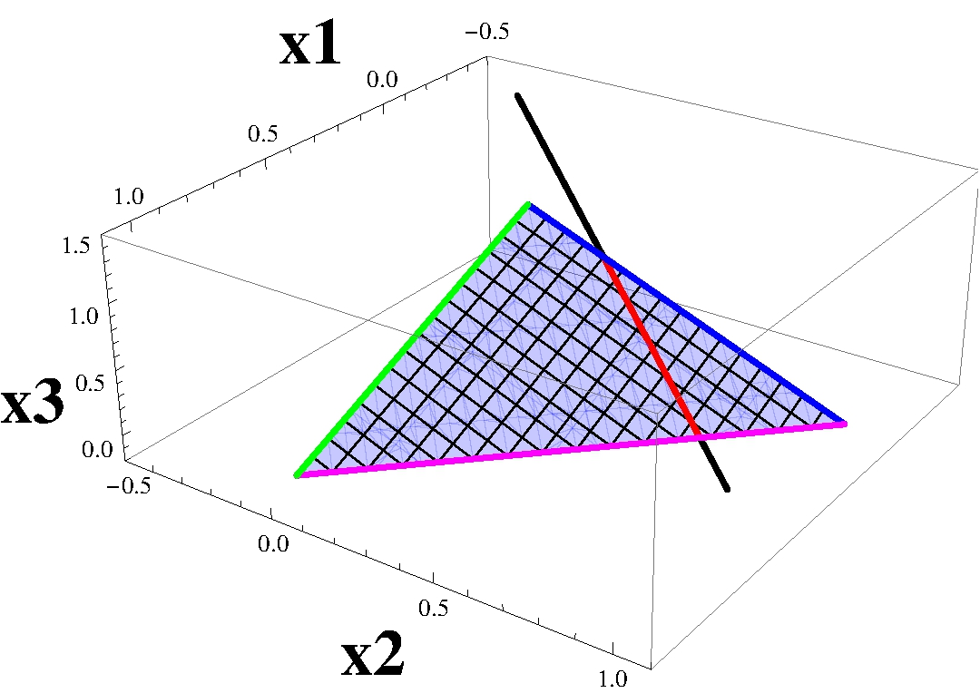 Rysunek do przykładów dla modelu Markowitza